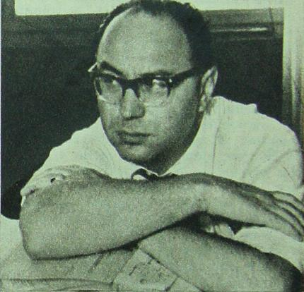 Bernardo Grinspun durante su gestión como secretario ejecutivo del Congreso de Desarrollo. Presidencia de Arturo U. Illia en Argentina (1963/1966).